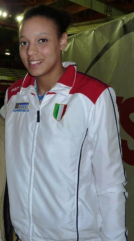 Valentina Diouf, pallavolista italiana, gioca nel ruolo di opposto